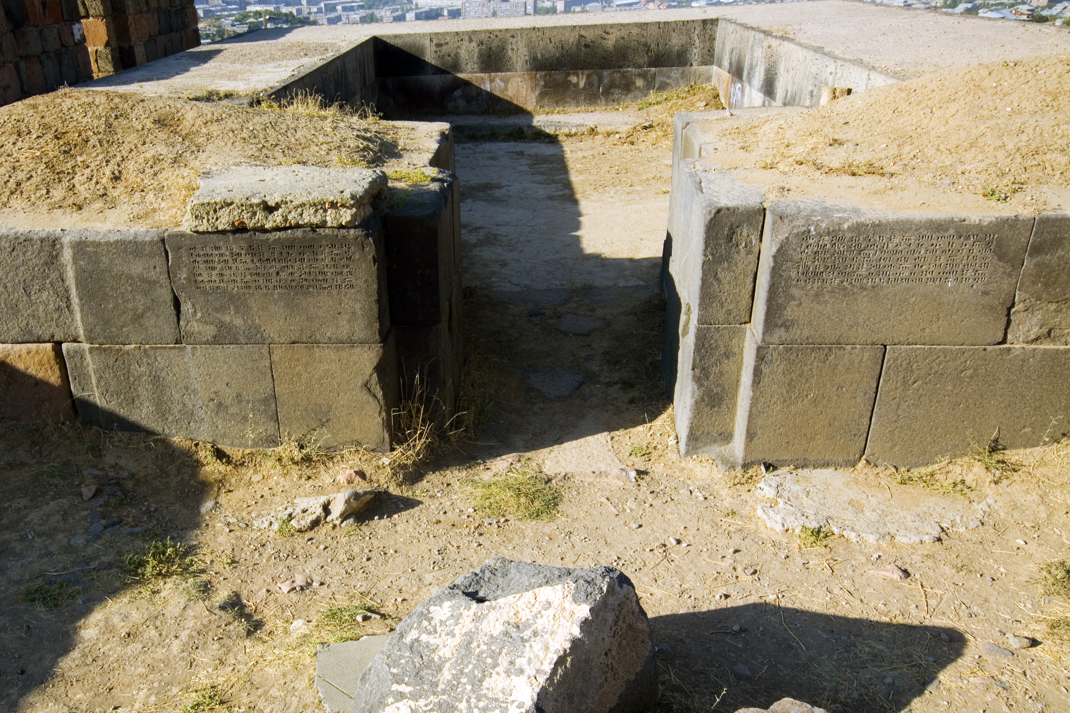 Susi Temple in Erebuni